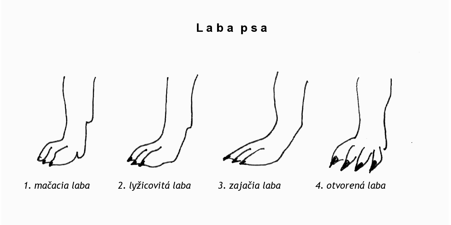 Popis: Typ laby psa Zdroj: vlastný obrázok (inšpirovaný obrázkom č. 19 na str. 22 knihy: Najman, J.; Novotný, J.: Atlas plemen psů. Státní zemědělské nakladatelství Praha. 1973. ISBN 07-035-73) Dátum: 2.1.2006 Autor: Prskavka Povolenie: PD Iné verzie tohto súboru: nie